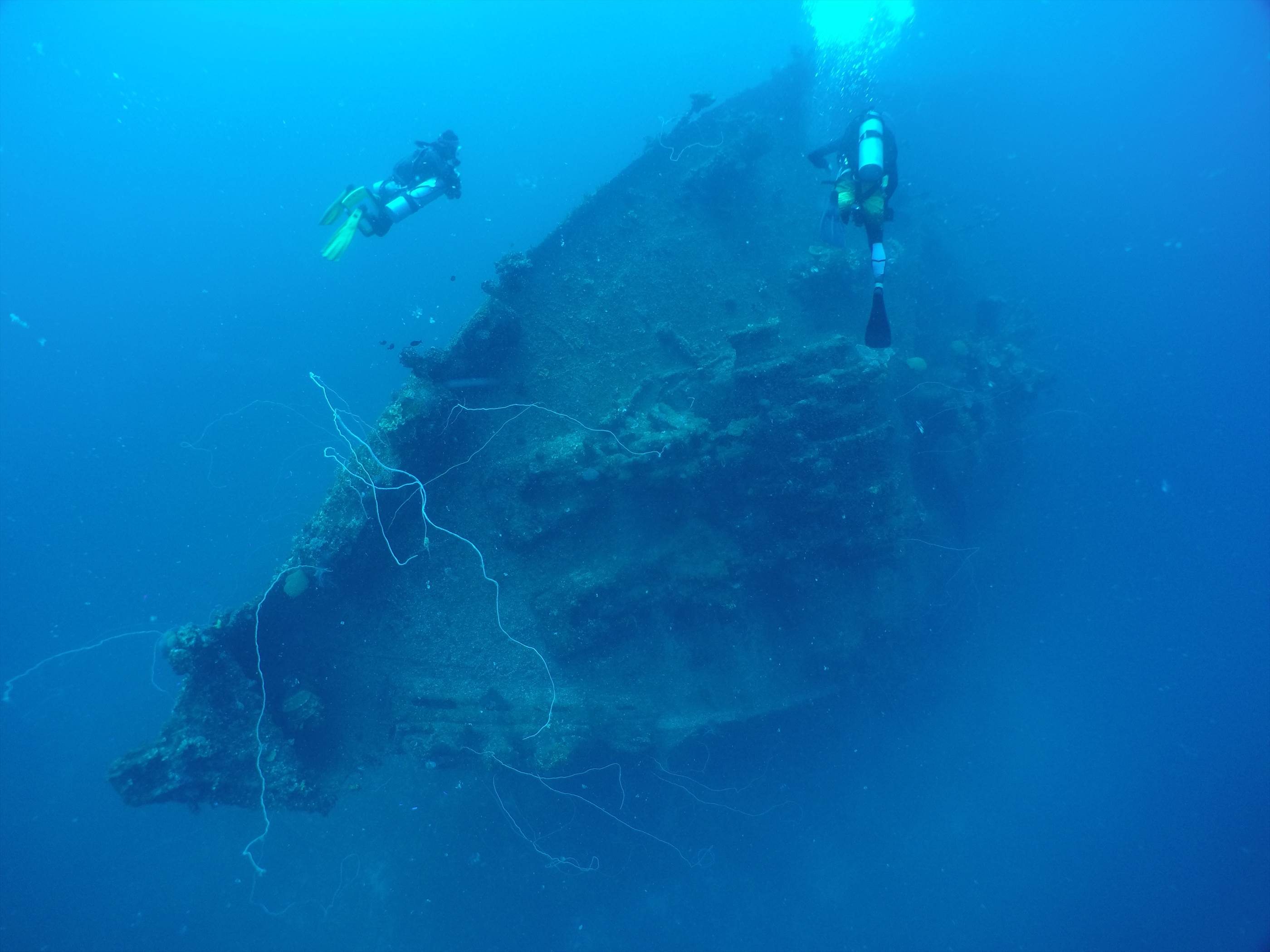 Fujisan maru